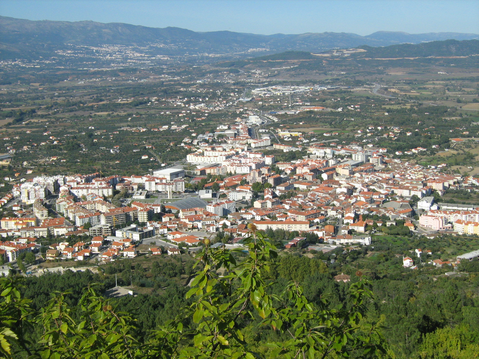 Vista panorâmica da cidade do Fundão (Portugal).